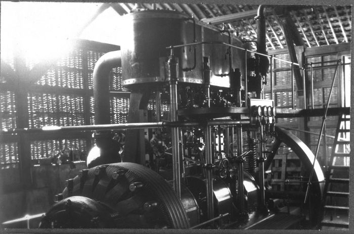 Foto. De 365 PK Stork-stoommachine met generator in de Machinale Houtzagerij en Boschexploitatie 'Sapoeran' in de omgeving van Wonosobo op Midden Java